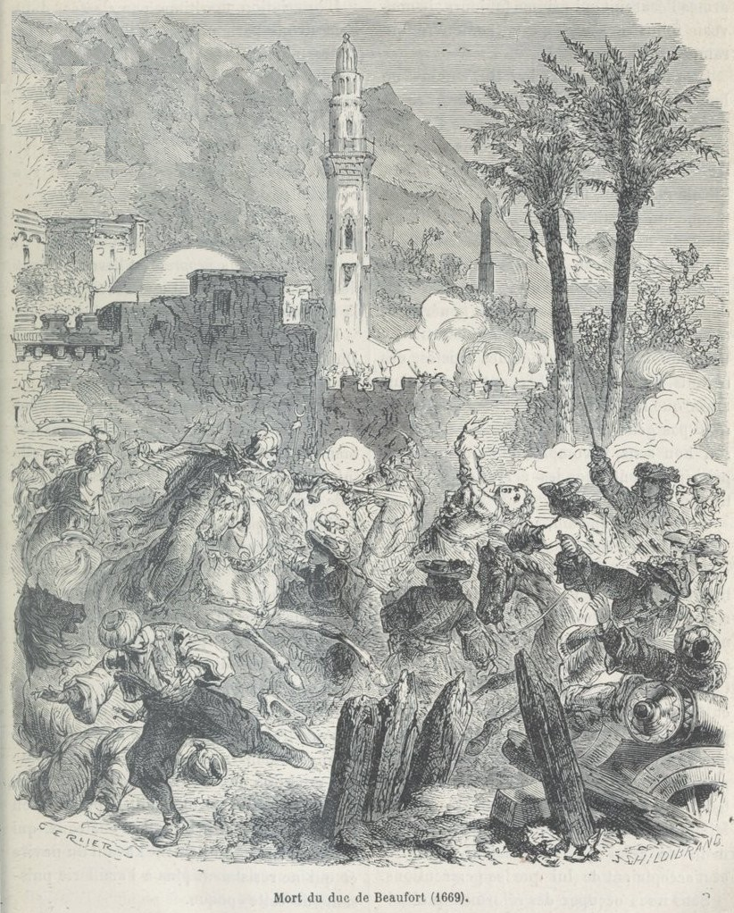 La mort du duc de Beaufort au siège de Candie en 1669, vue par un illustrateur de la fin du XIXème siècle.